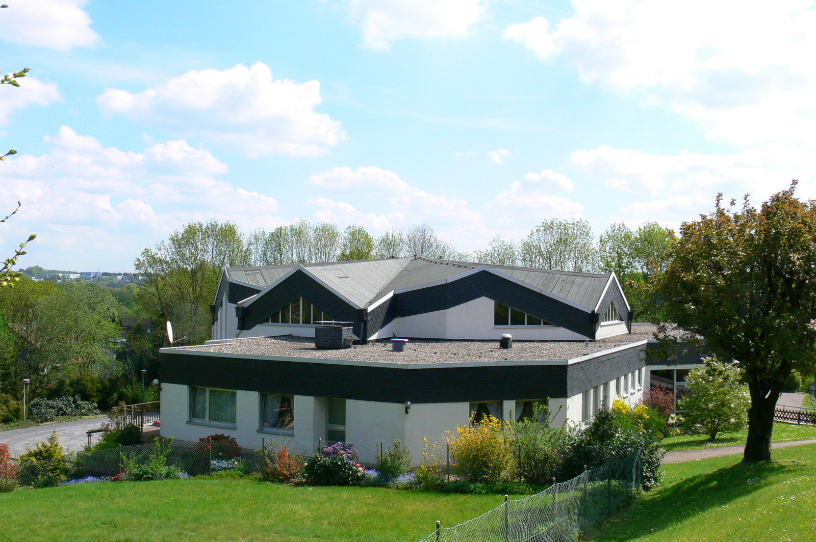 Frontansicht der EFG Wermelskirchen. Der Stil des Gebäudes ist einem Zelt nachempfunden in Anlehnung an den Text aus dem Neuen Testament, Brief an die Hebräer Kapitel 13, Vers 14: Wir haben hier keine bleibende Stadt, sondern die zukünftige suchen wir.